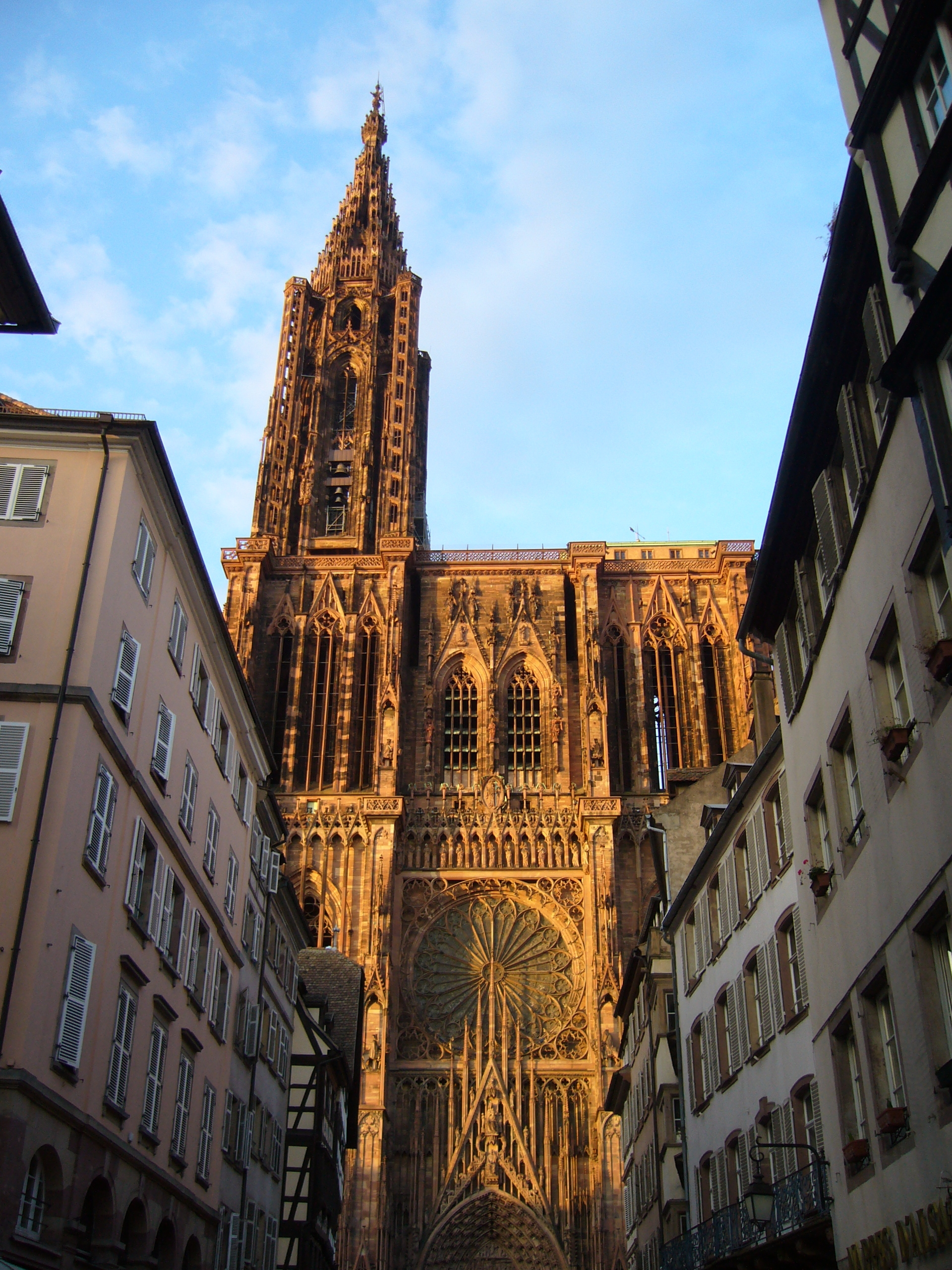 La Cathédrale de Strasbourg